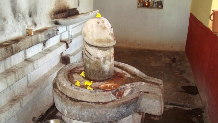 Линга-мурти из храма в Девипурам